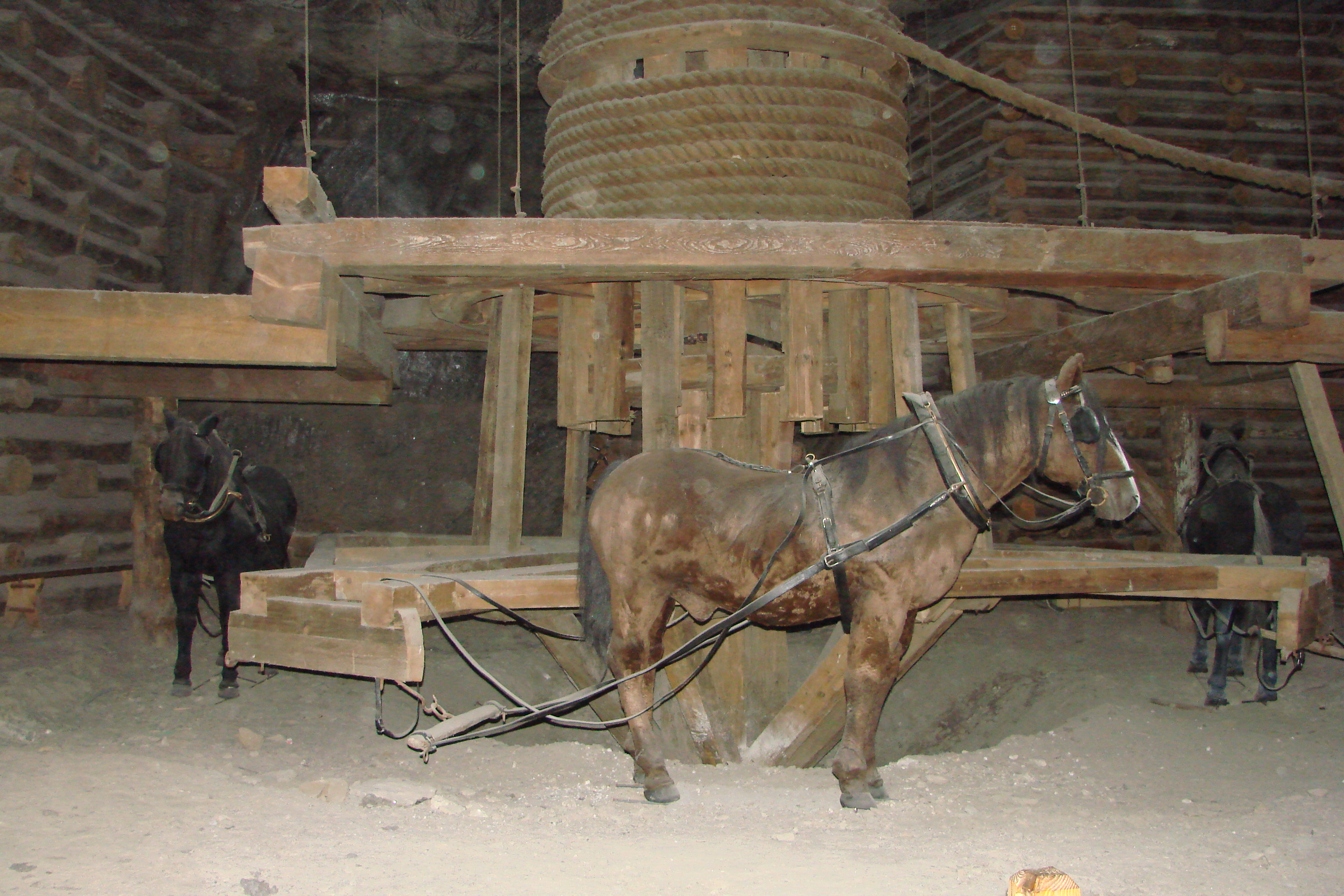 Wieliczka, Poland